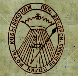 Печатка Кобеляцької роти Дніпровського пікінерського полку. 1795 рік. (За Китицын П.А. Печати городов 3-х малороссийских казачьих полков в XVIII столетии. // Труды Полтавской Ученой Архивной Комиссии. Выпуск второй. Полтава. Электрическая типография Г. И. Маркевича, Протопоповская ул., Панский ряд. 1905. с. 101 - 104)